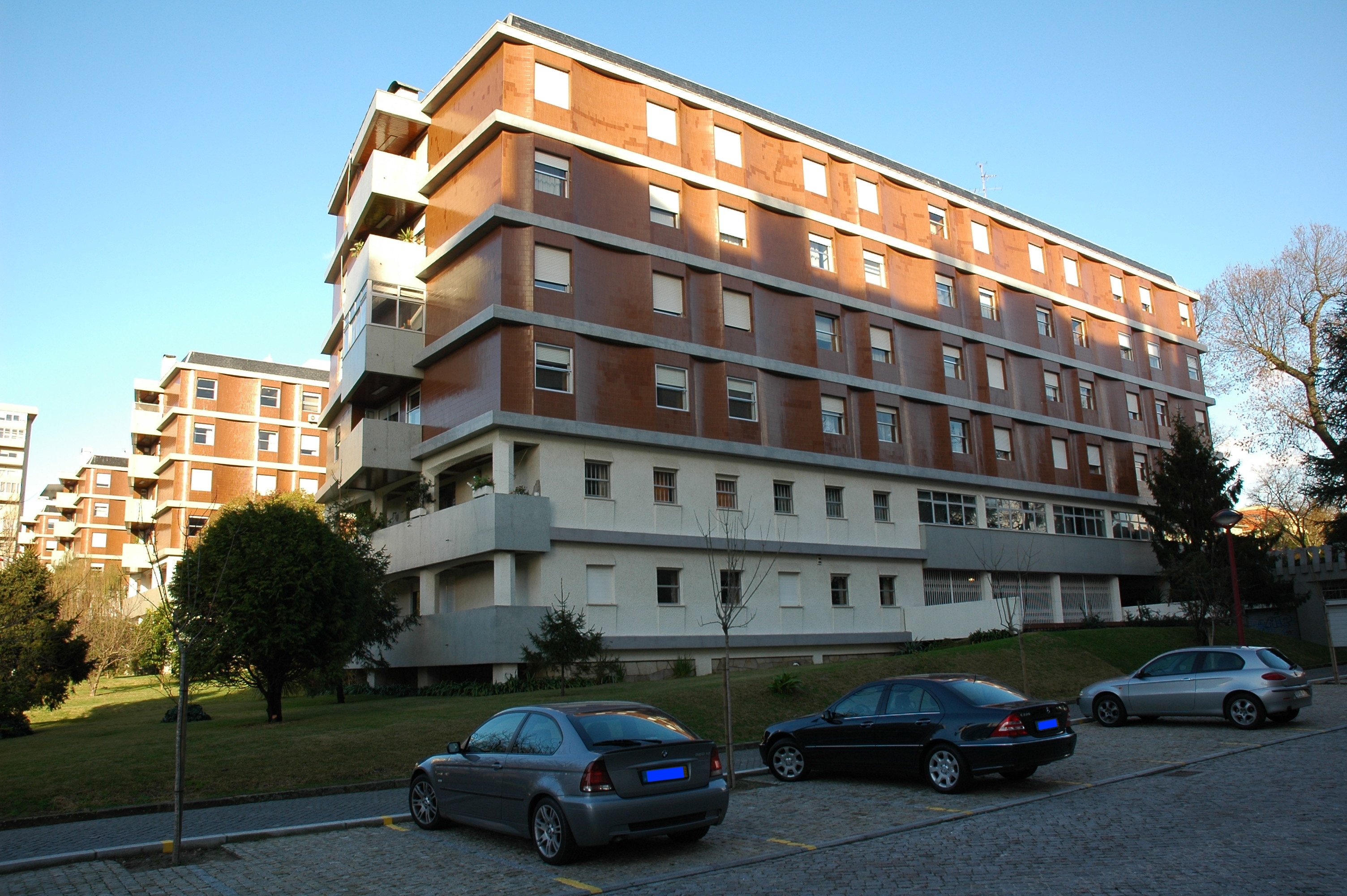 Blocos habitacionais, chamados "blocos de chocolate", na Rua António Cardoso no Porto - Portugal. Arq. Hargreaves da Costa Macedo